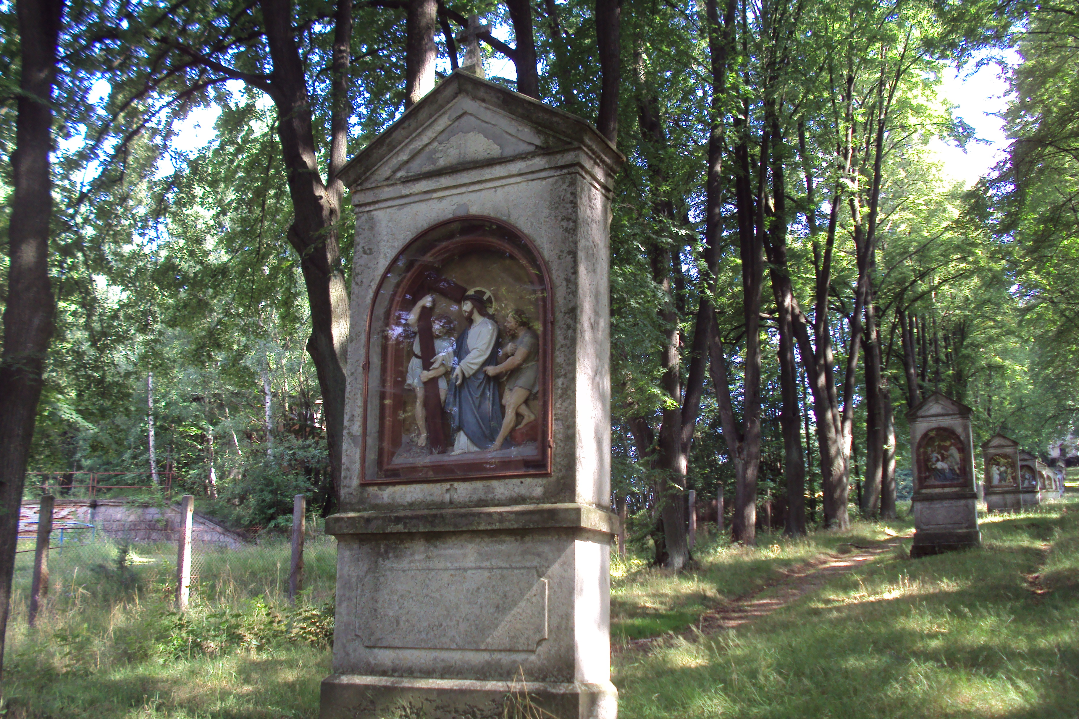 2 část Kalvárie Cvikov